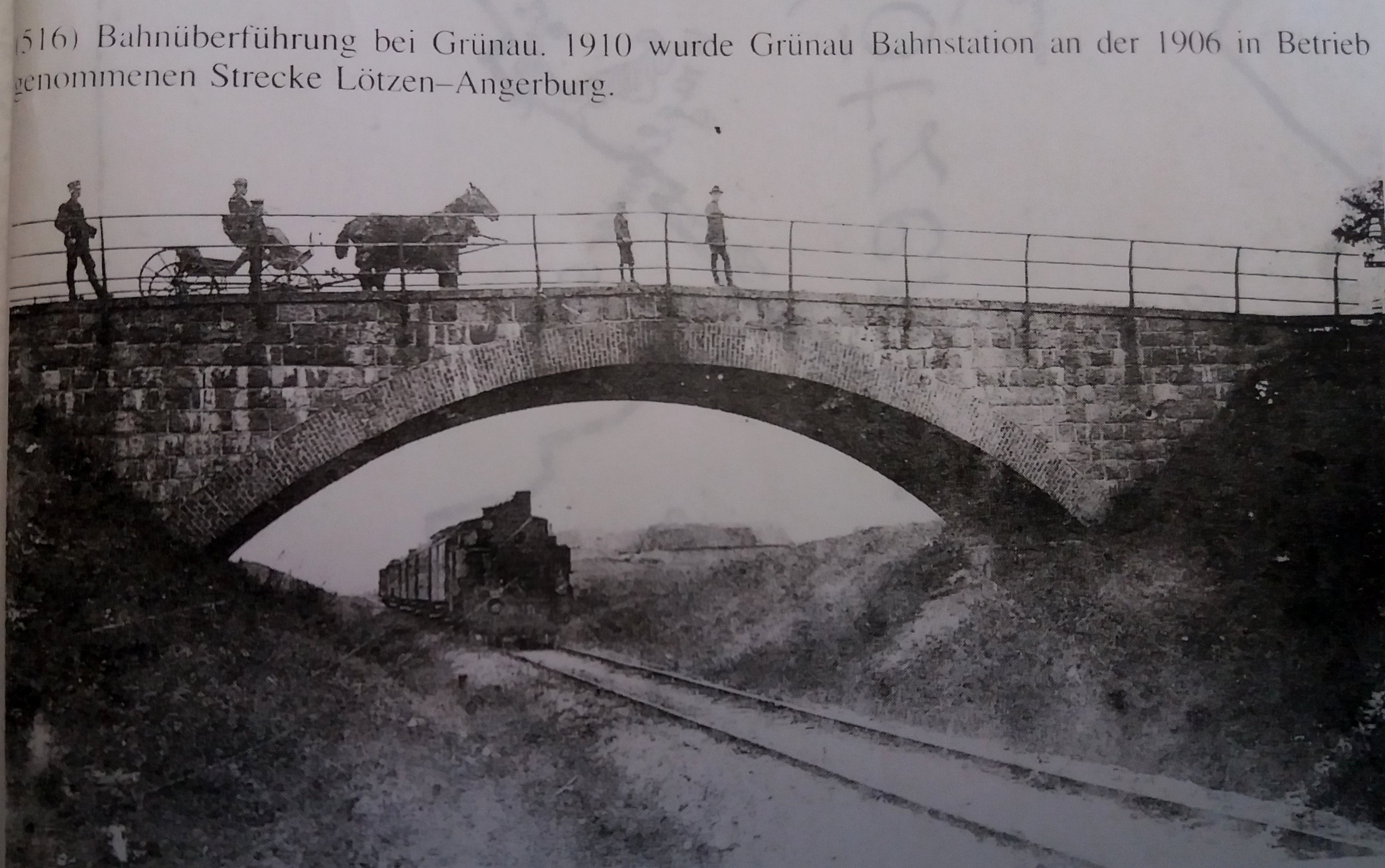 Bahnunterführung Pietzonken/Grünau